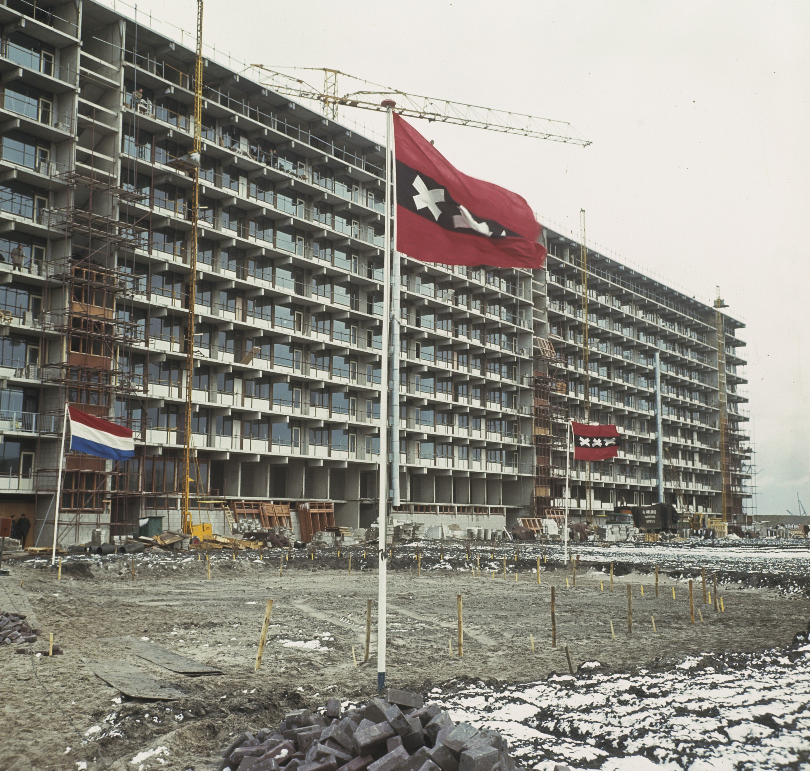 Collectie / Archief : Fotocollectie Anefo Reportage / Serie : [ onbekend ] Beschrijving : Bijlmermeer: flats in aanbouw Datum : 4 april 1968 Locatie : Amsterdam, Noord-Holland Trefwoorden : FLATS Persoonsnaam : bijlmermeer Fotograaf : Kroon, Ron / Anefo Auteursrechthebbende : Nationaal Archief Materiaalsoort : Dia (kleur) Nummer archiefinventaris : bekijk toegang 2.24.01.07 Bestanddeelnummer : 254-8044